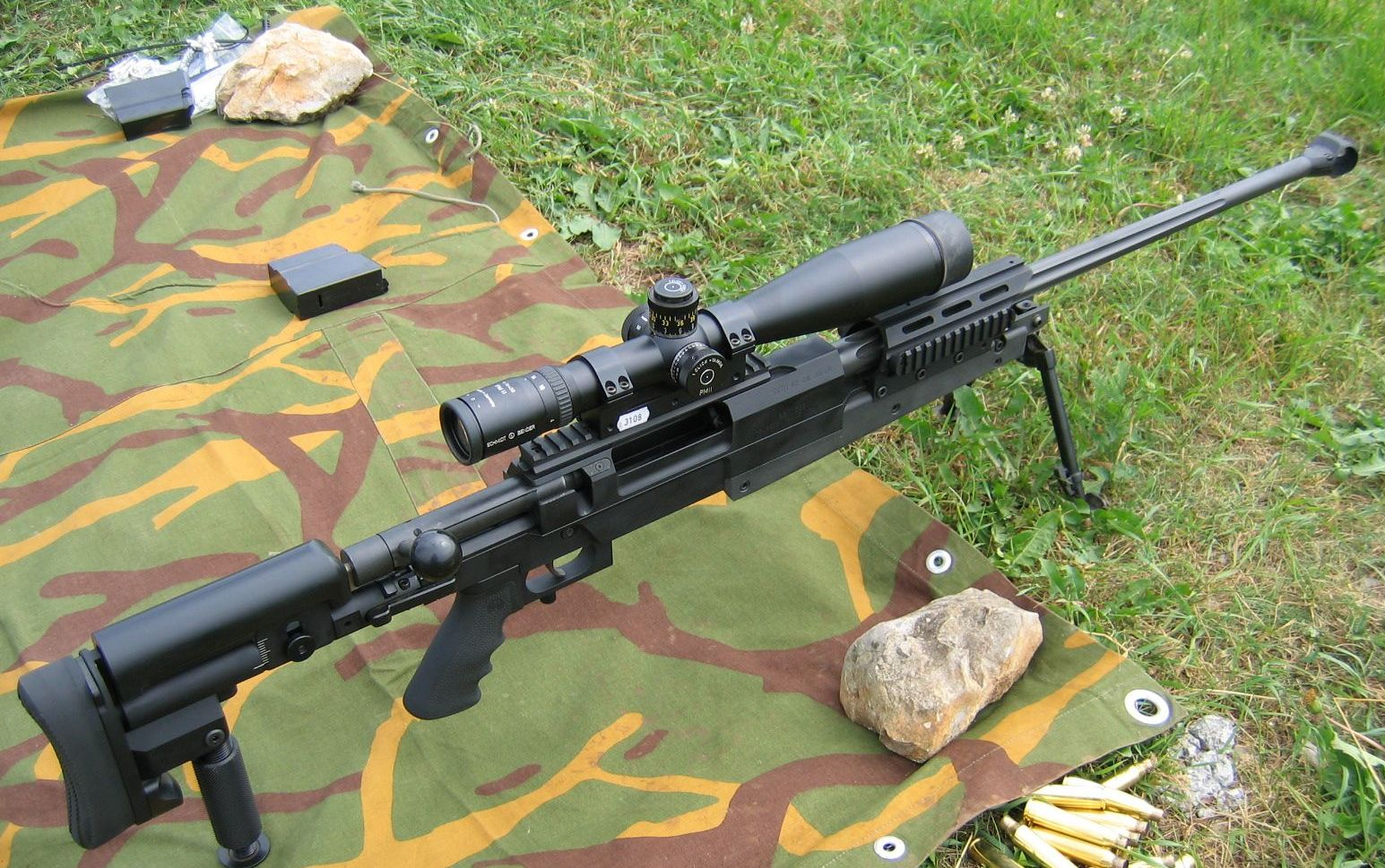 Mini Hecate .338 Lapua Magnum sniper rifle